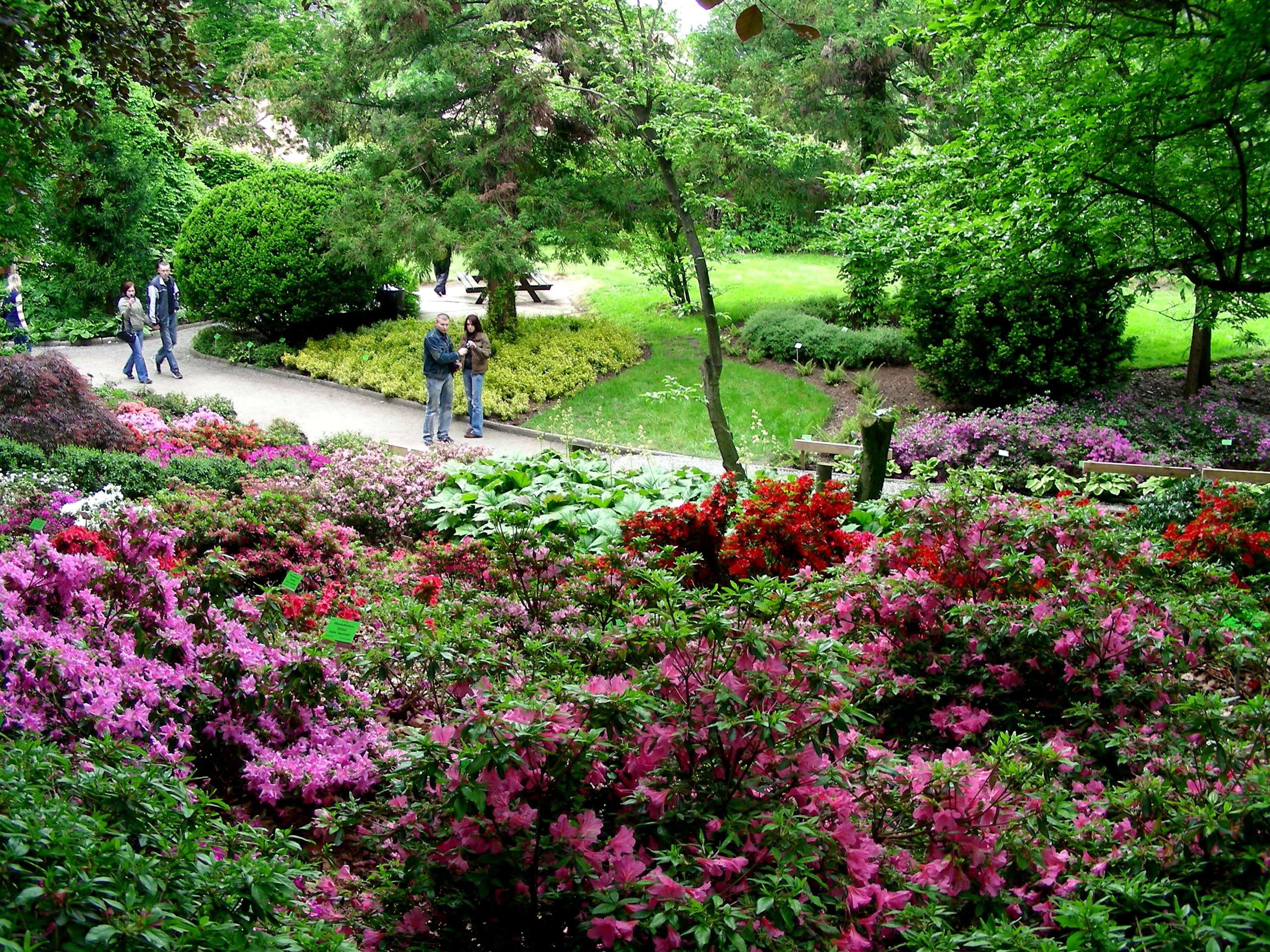 Arboretum w Wojsławicach, gmina Niemcza, województwo Dolnośląskie, Polska